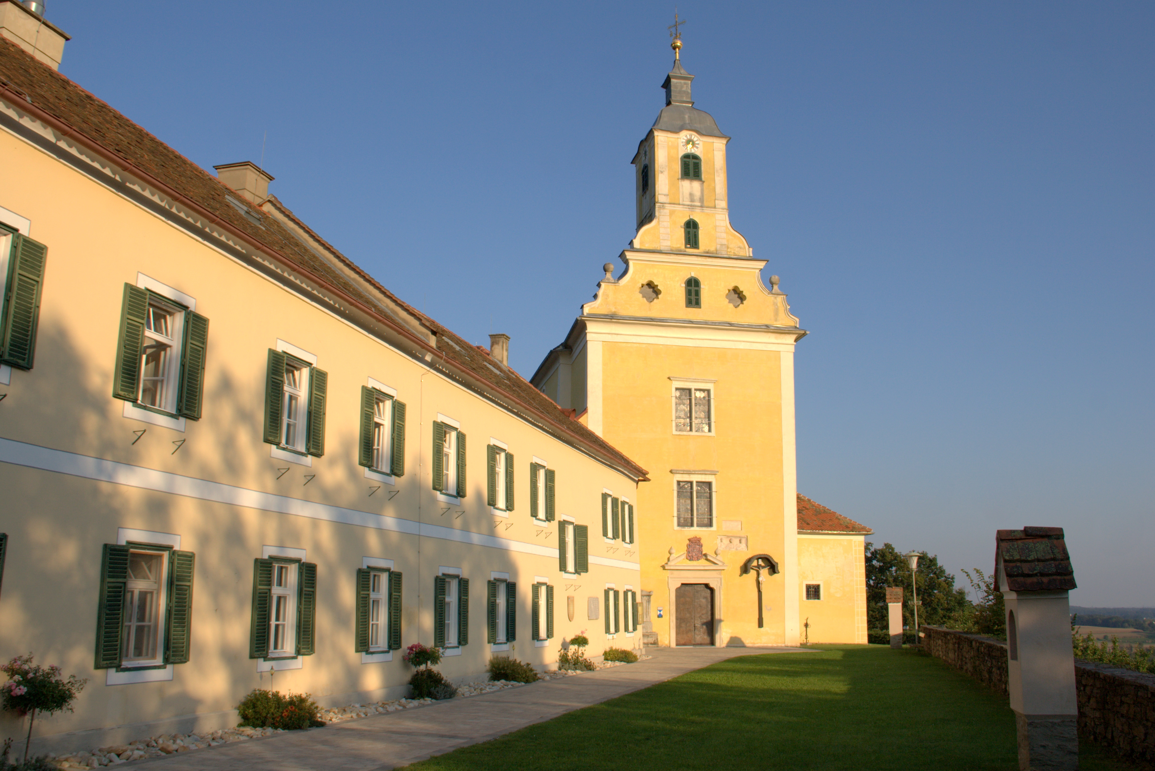 Kath. Pfarrkirche hl. Johannes der Täufer und Pfarrhof